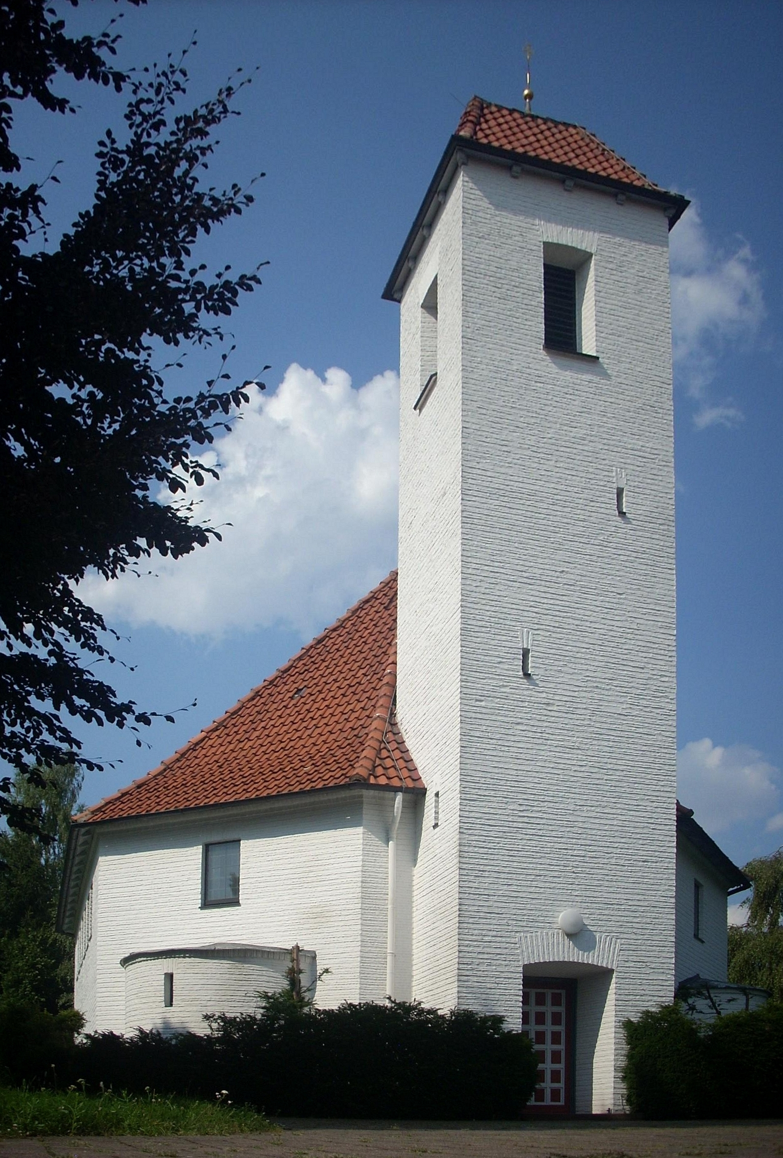 Elze, Kath. Kirche St. Petrus zu den Ketten